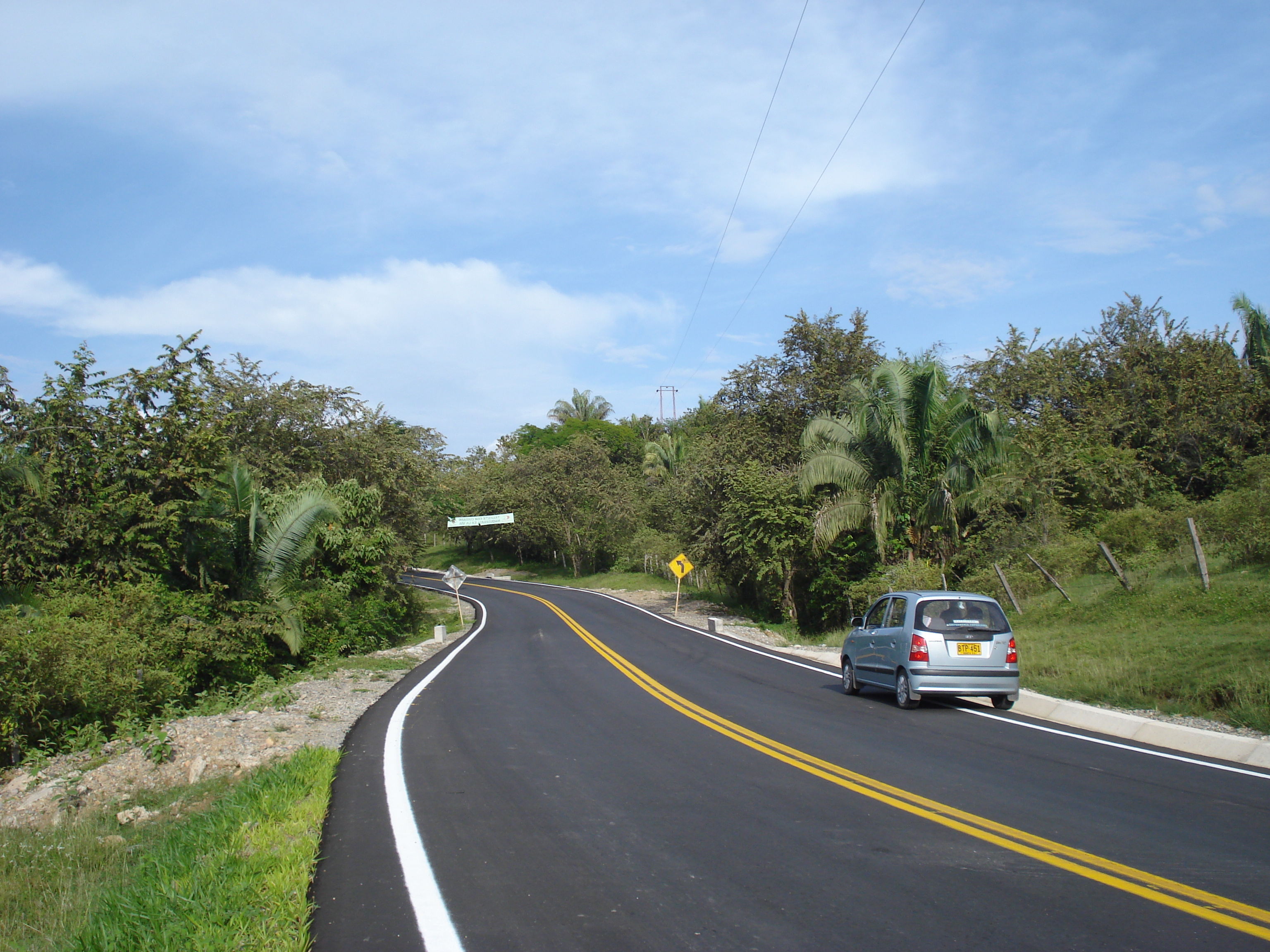 Via nueva Ortega-Chaparral Tolima Colombia